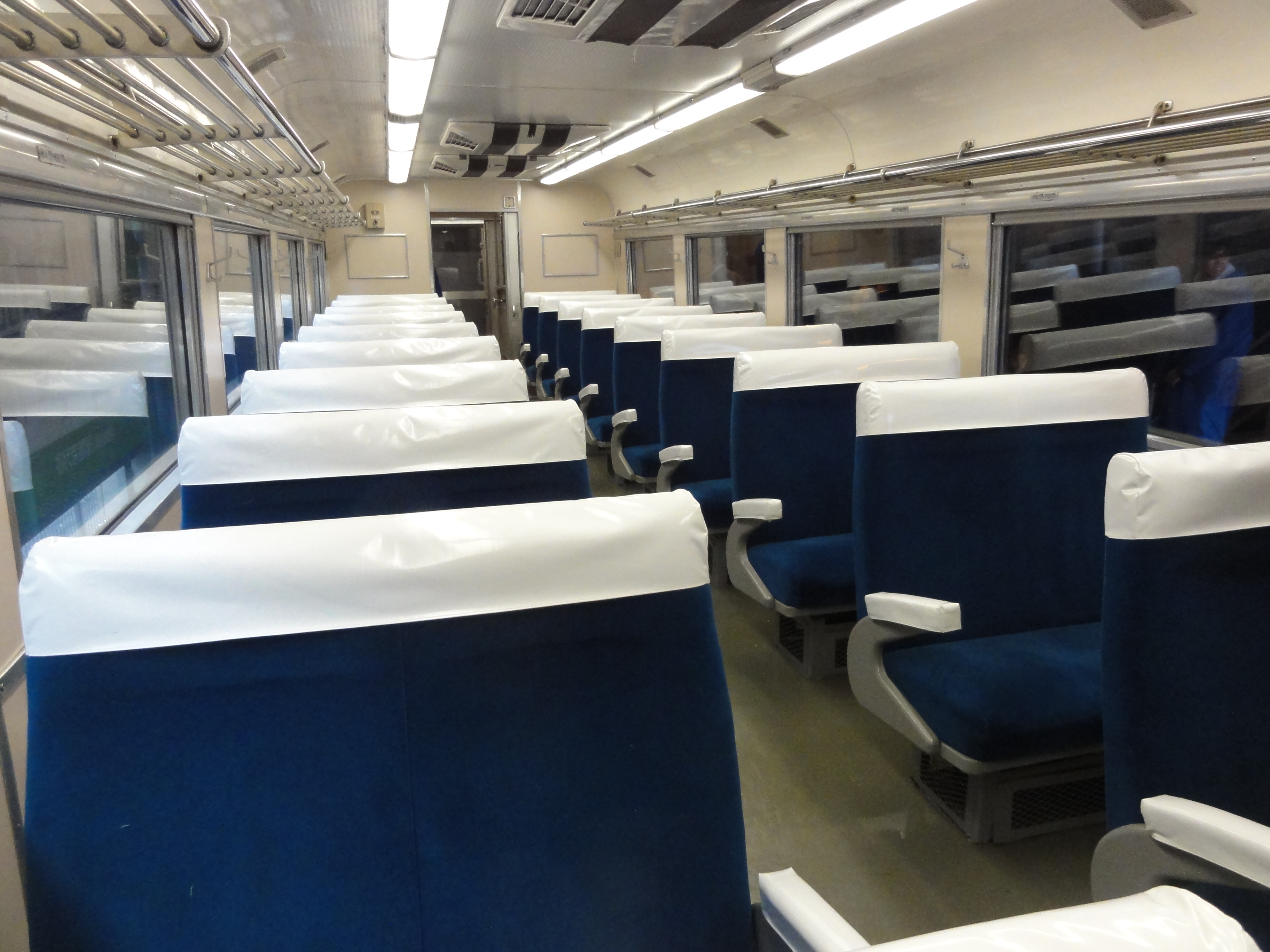 国鉄キハ80系気動車 キハ81 車内